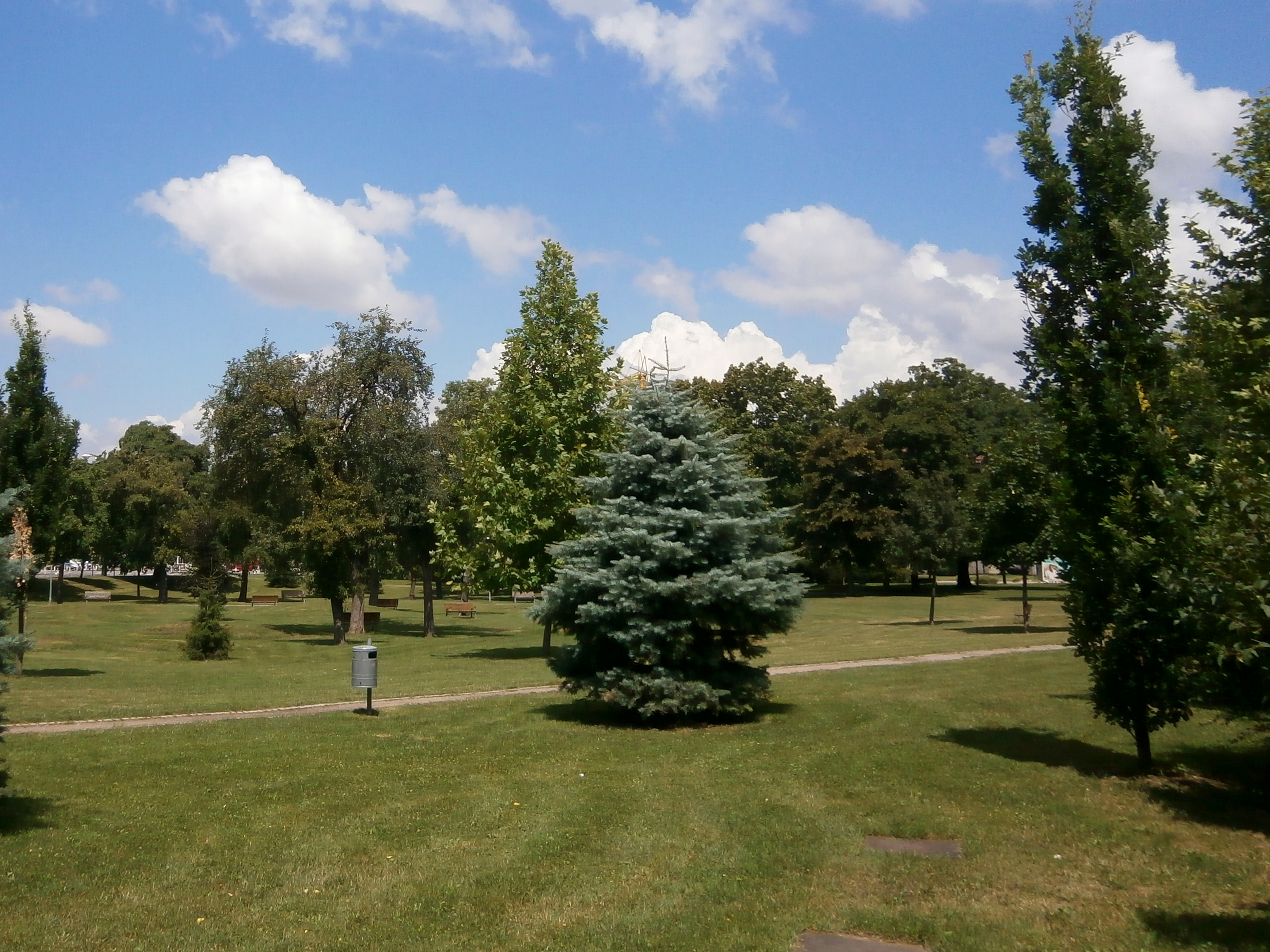 Sukovy sady, původně Fialovy sady (podle obecního starosty, zakladatele okrašlovacího spolku a iniciátora vzniku parku)